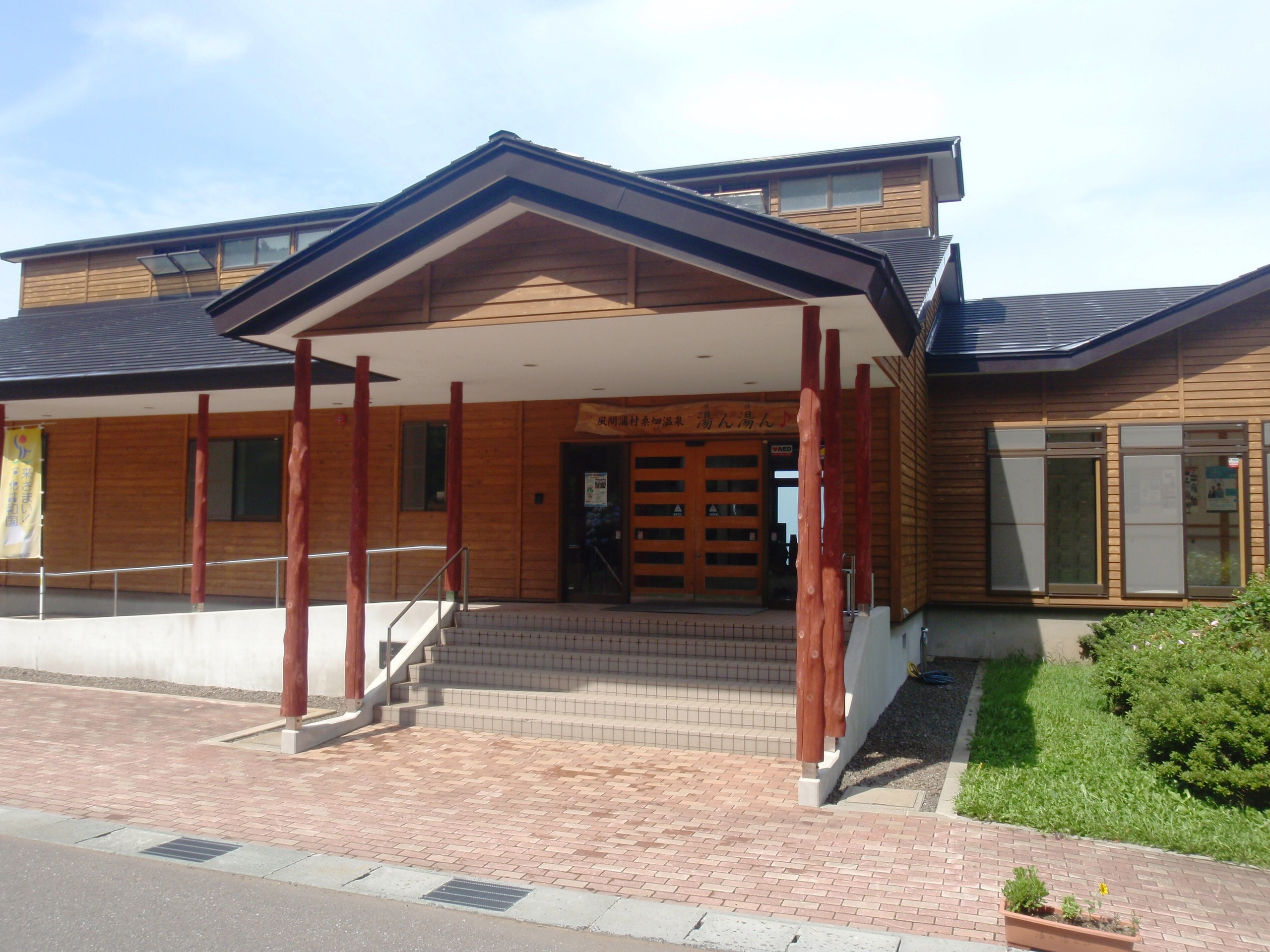 桑畑温泉、湯ん湯ん♪